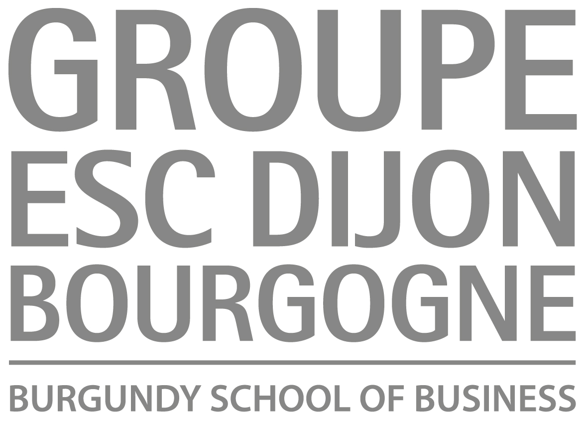 Logo du Groupe ESC Dijon-Bourgogne